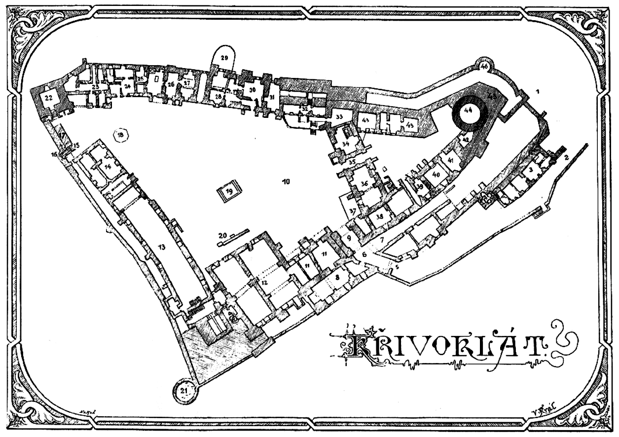 Křivoklát – půdorys hradu od Vojtěcha Krále z Dobré Vody publikovaný roku 1891; Popis: 1 – příkop, 2 – místo bývalé brány, 3 – četnická kasárna, 4 – bašta, 5 – druhá brána, 6 – průjezd, 7 – parkán, 8 – spilka, 9 – Prochoditá věž, 10 – nádvoří, 11 – lednice, 12 – pivovar, 13 – západní budova předhradí, 14 – novější přístavek s byty a kancelářemi, 15 – schodiště ke hradbě, 16 – vížka se schodištěm na hradbu, 17 – kůlna, 18 – studna, 19 – kašna, 20 – vchod do sklepů, 21 – Zlatá věž (Lidomorna), 22 – věž Huderka, 23 – bývalá kovárna, 24 – bývalá pekárna, 25 – bývalé jatky, 26 – bývalá vinopalna, 27 – bývalá moučnice, 28 – bývalá kuchyně, 29 – bývalá věž Na Liškách, 30 – paštikárna, 31 – spižírna, 32 – spižírna, 33 – sklep, 34 – sklep, 35 – průjezd brány do hradního jádra, 36 – sklep a nad ním královský palác, 37 – prampouch, 38 – sklep, 39 – sklep, 40 – sklep, 41 – sklep a vězení, 42 – sklep a snad bývalá strážnice, 43 – sklepy, 44 – velká věž, 45 – plášť, 46 – bašta